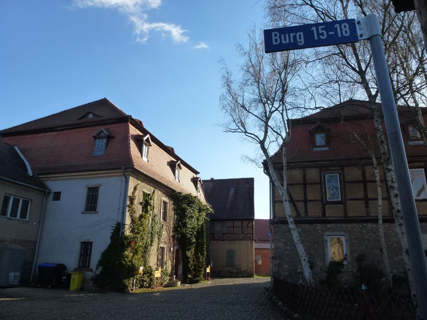 Wassermühle in Holleben